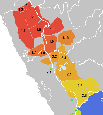 Categoría:Mapas del Perú (imagen) Categoría:Quechua